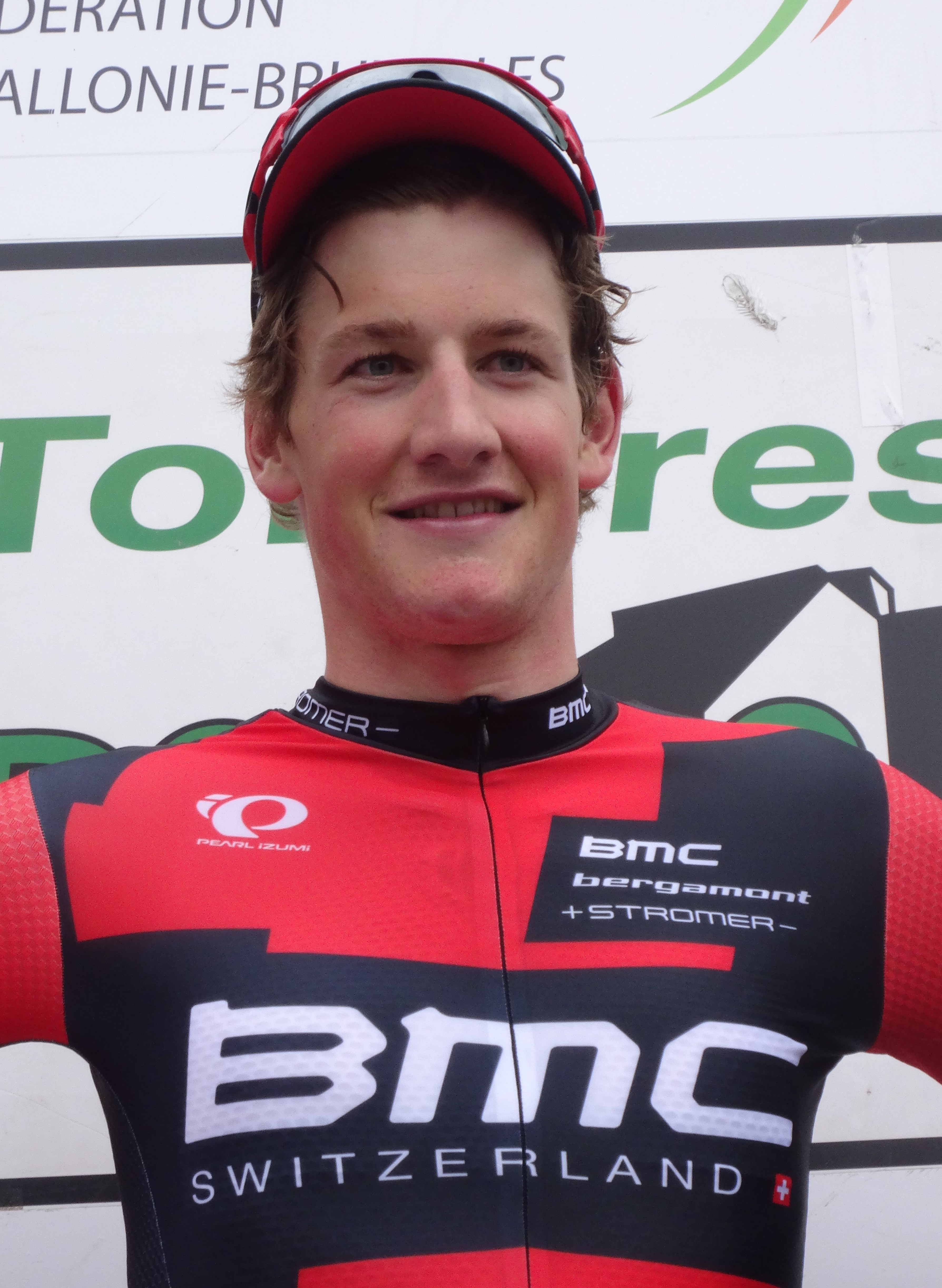 Reportage photographique réalisé le dimanche 22 juin à l'occasion du départ et de l'arrivée de la Flèche ardennaise 2014 à Herve, Belgique.